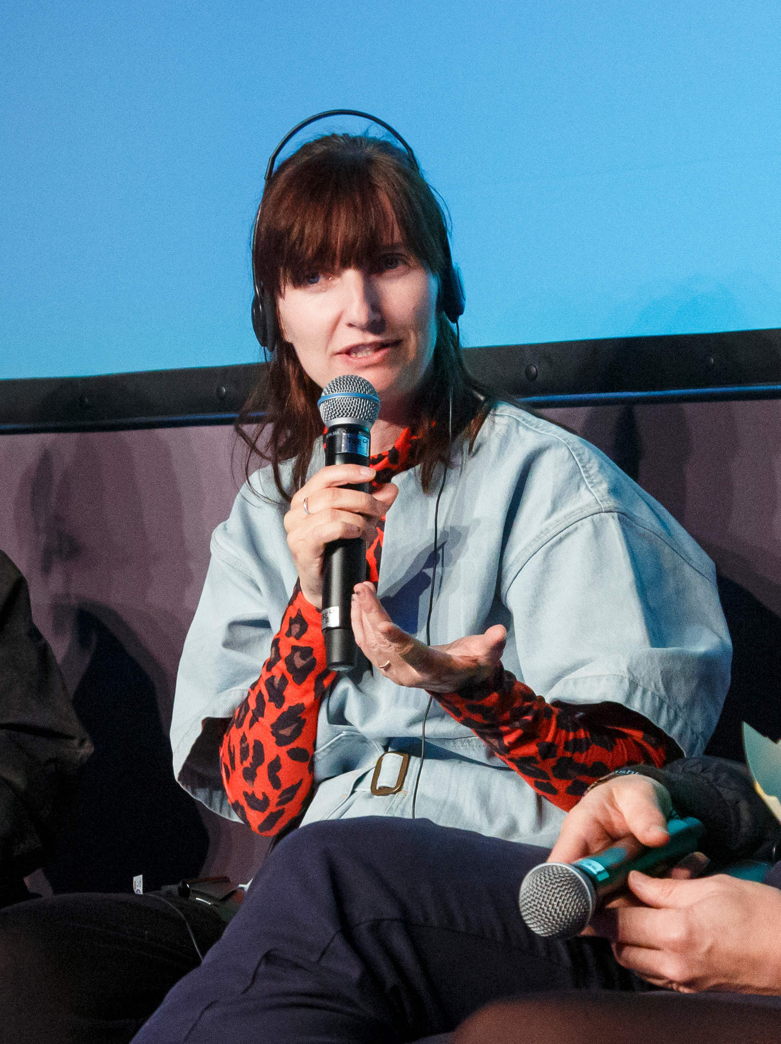 Session: Reality Check: Pop-Diskurs Speaker: Thomas Venker, Diviam Hoffmann, Sonja Eismann, Katharina Holzmann, Nadine Schildhauer